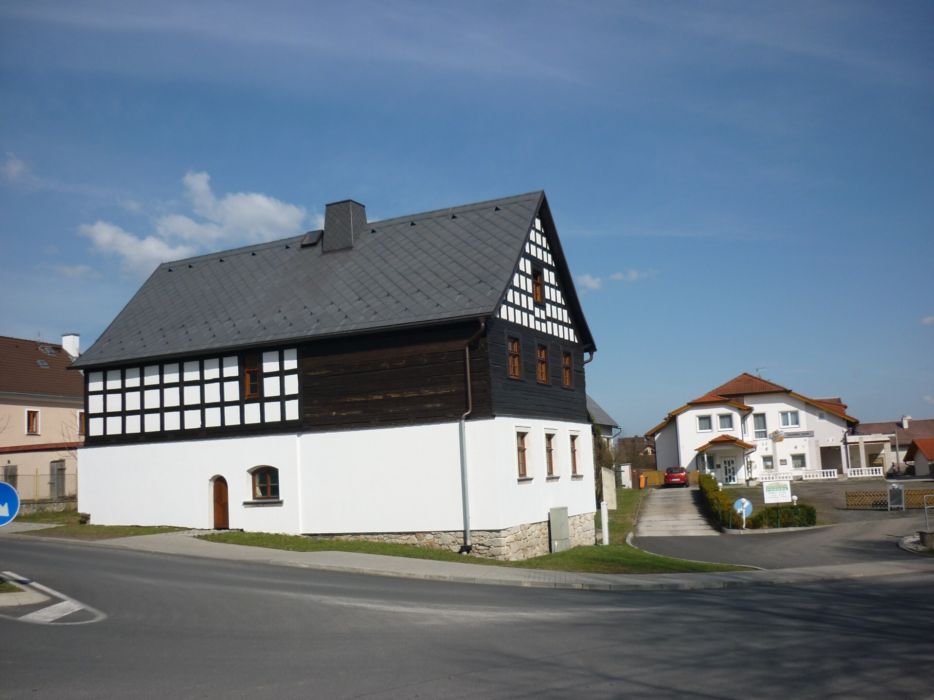 Skalná